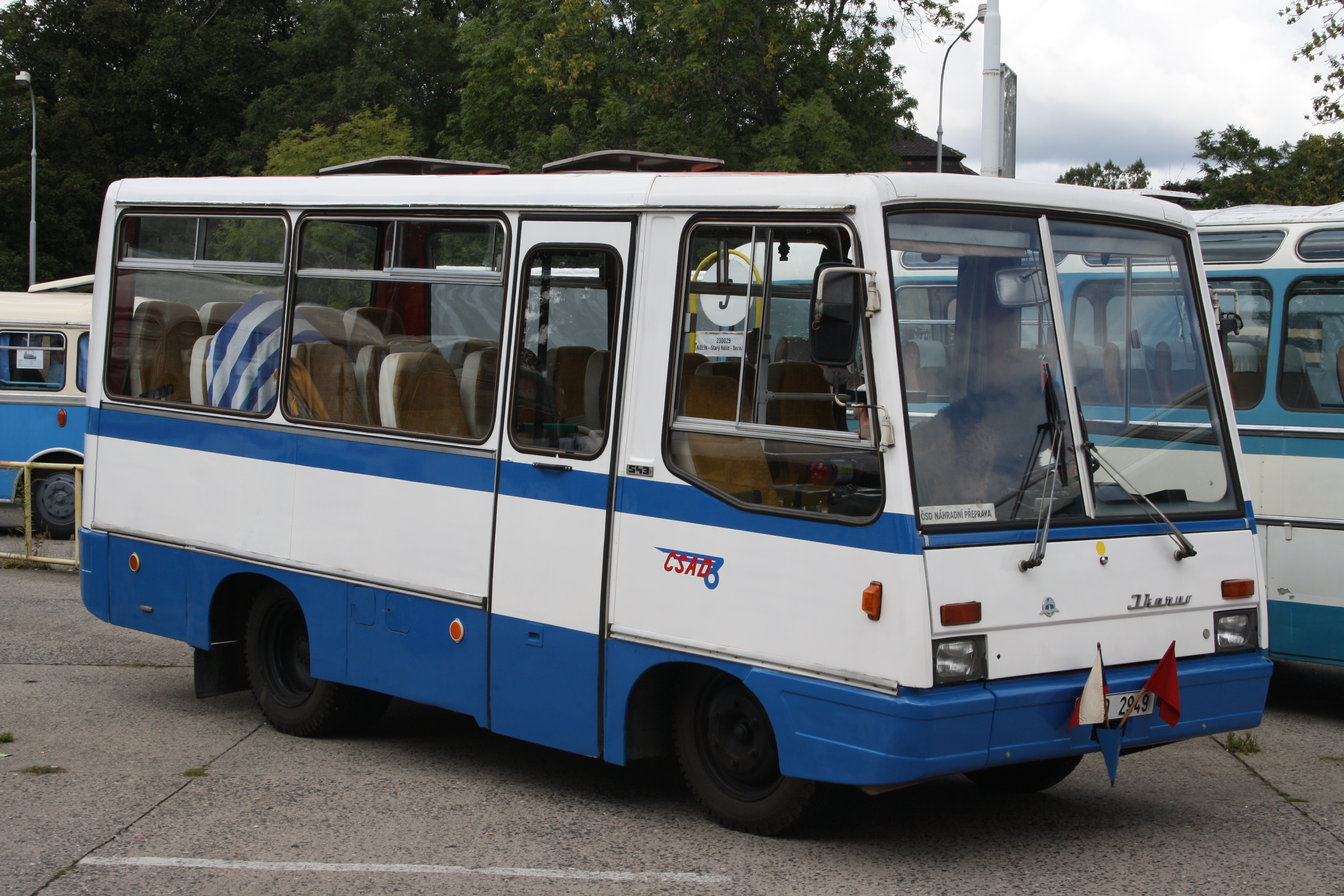 Autobus Ikarus-Avia 543 Midi na akci Zlatý Bažant 2012